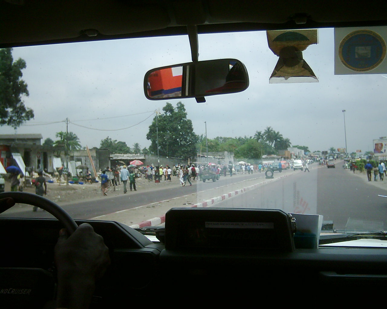 Boulevard Lumumba à N'Djili, Kinshasa, 2003. Personal picture, I set it in public domain.